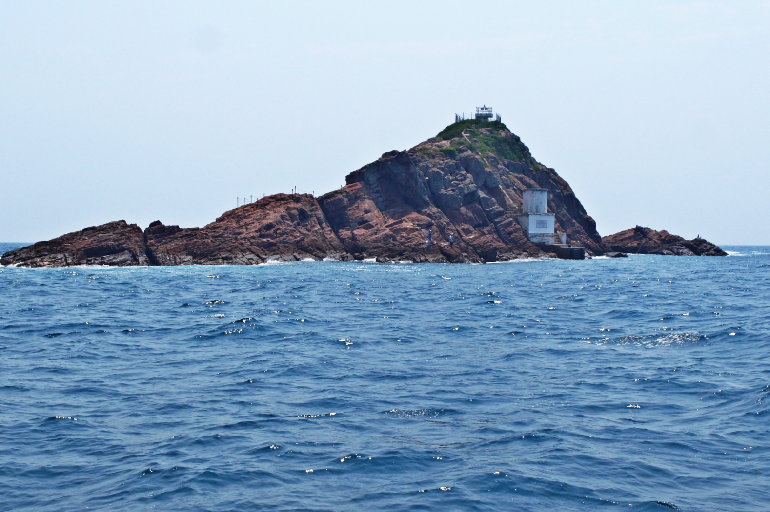 中文（香港）: 石牛洲的西岸，可清楚看到燈塔和鳥屋